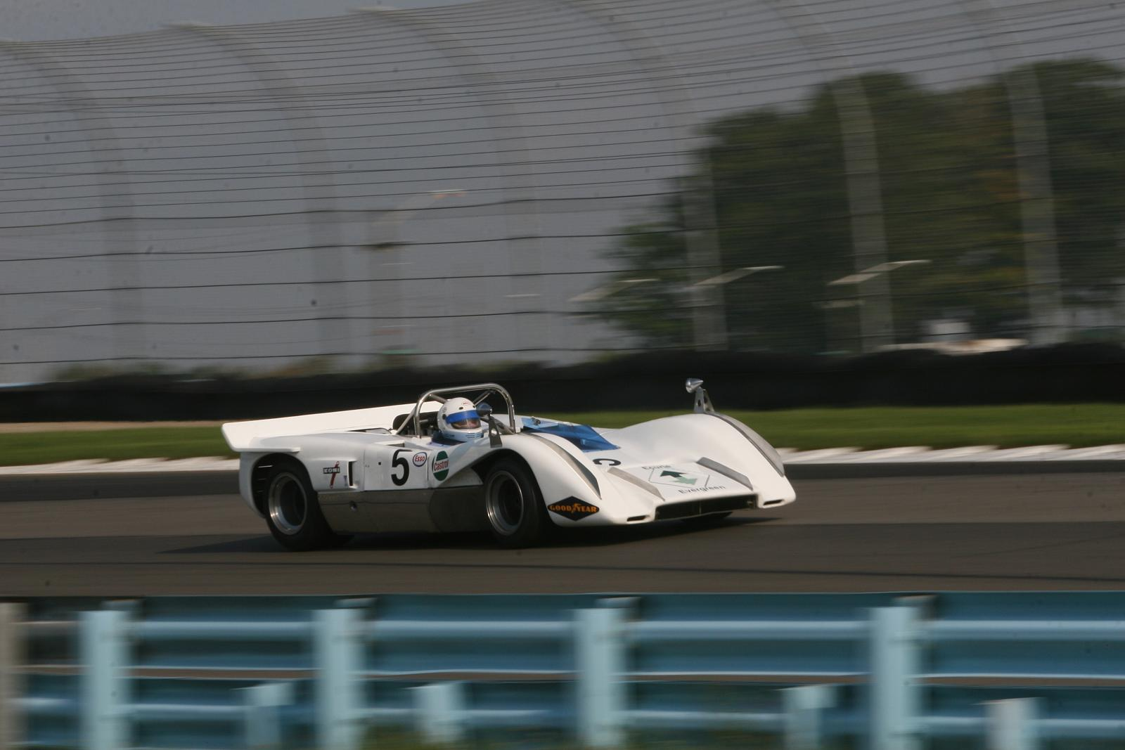 5 - 1970 McLaren M8C (3.0L) Jim Simpson